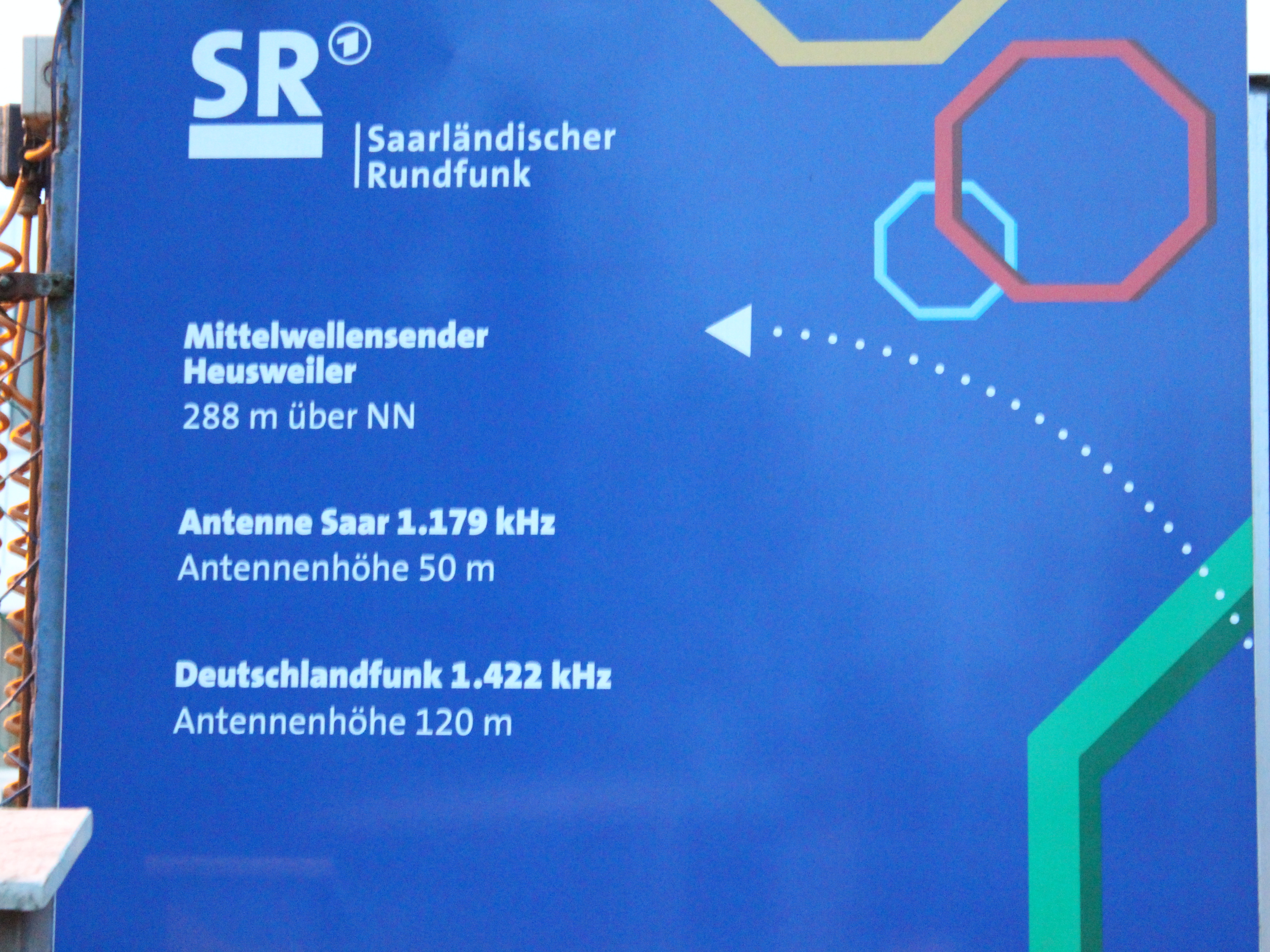 Informationstafel am Sender Heusweiler